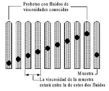 Viscosidad Cinematica